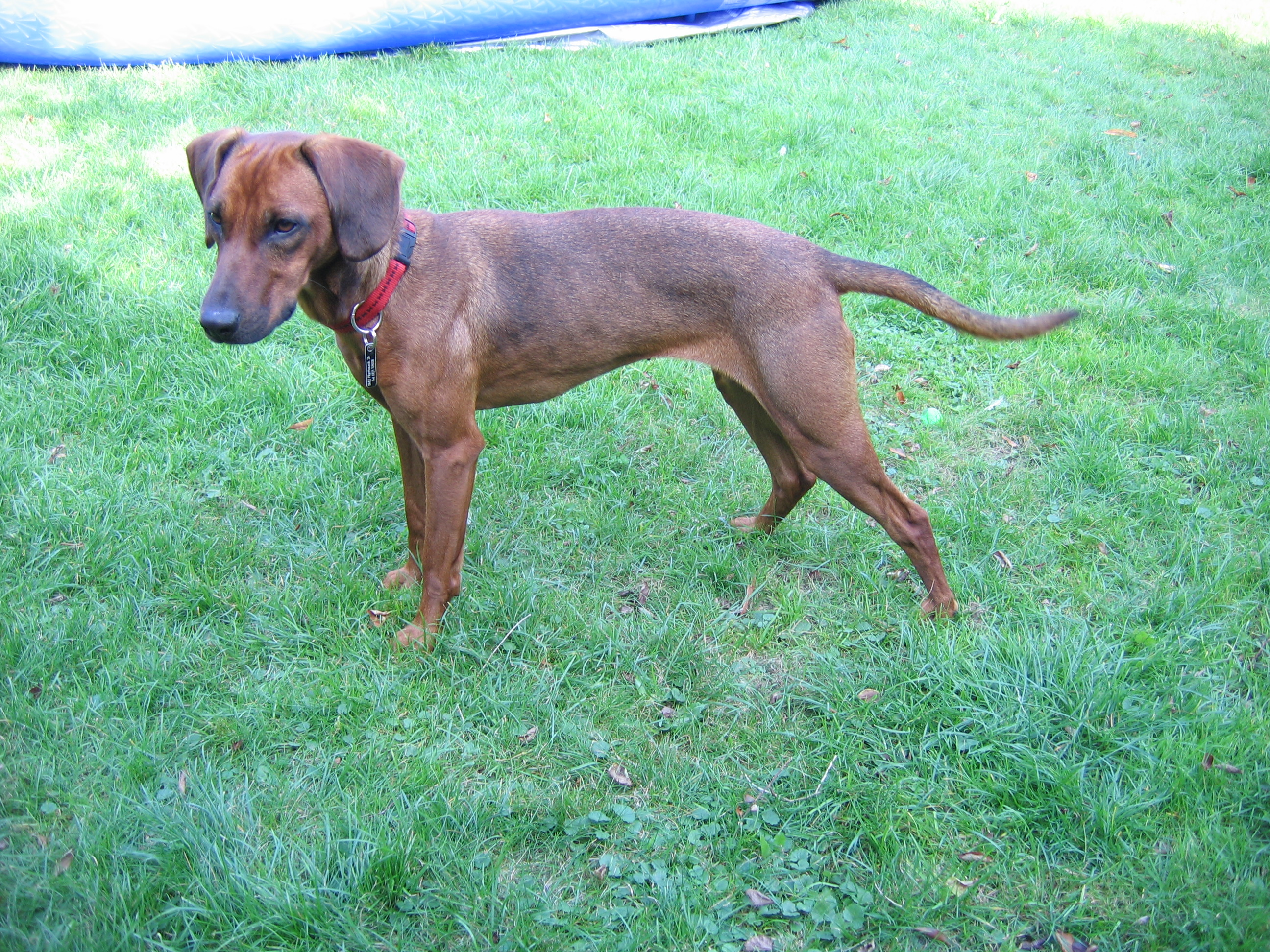 Tiroler Bracke